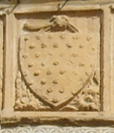 Stemma arte del cambio, firenze